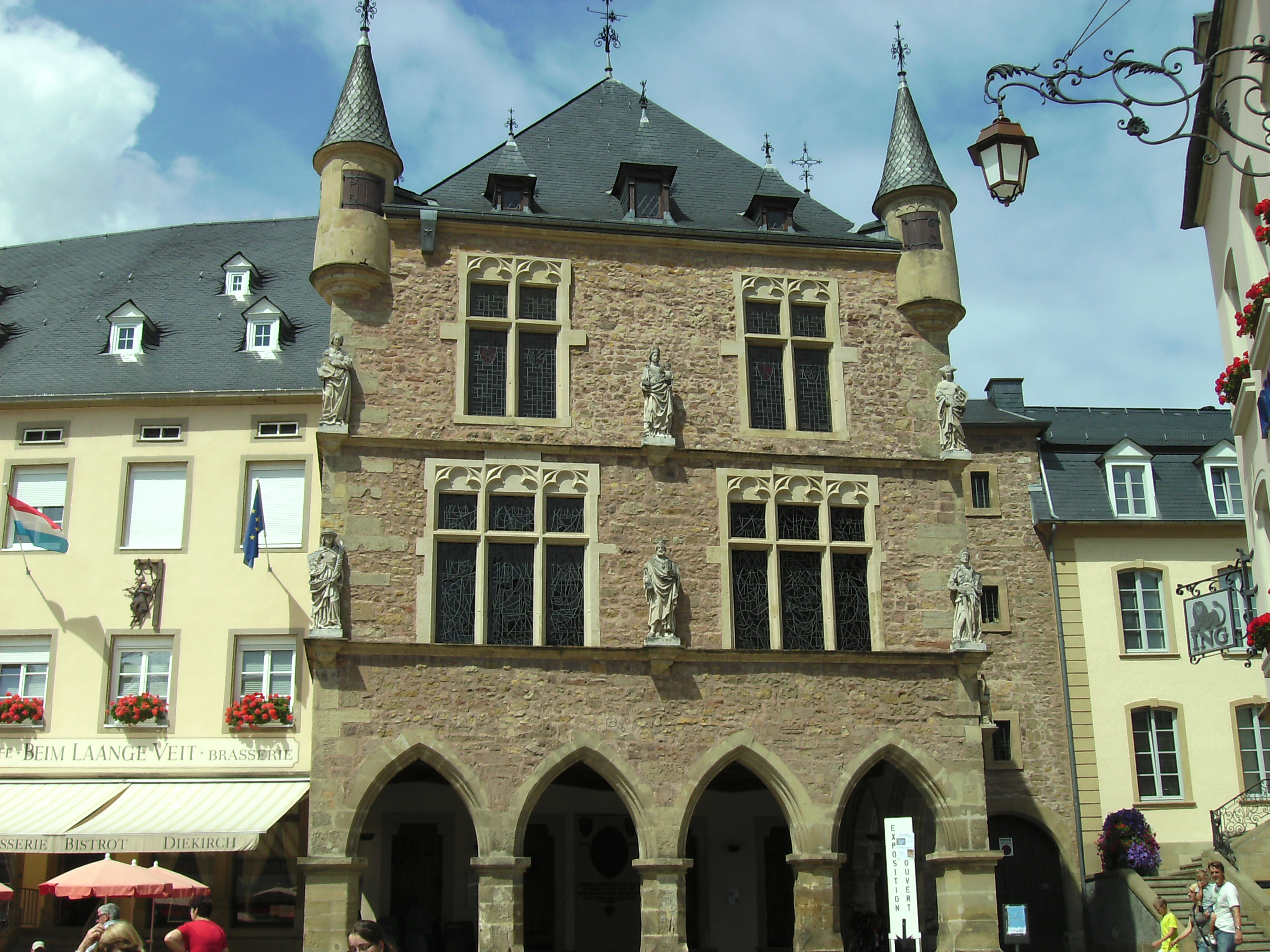 Echternach: Gerichtsgebäude oder "Deenzelt"